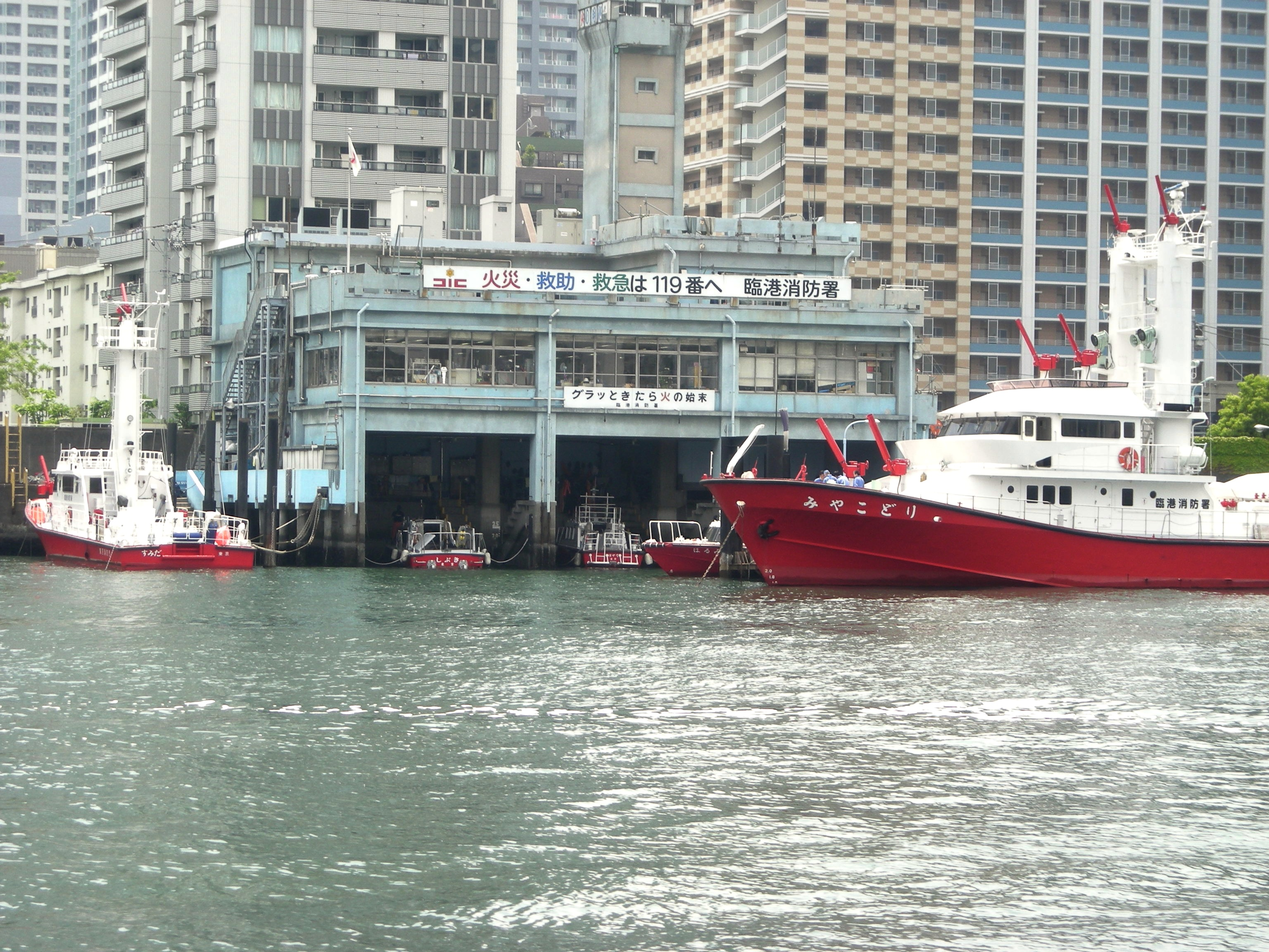 東京消防庁 臨港消防署 (東京都中央区勝どき5丁目)